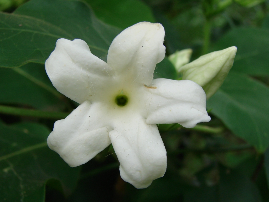 Schubertia grandiflora - APOCYNACEAE - Parque Olhos D'Água - Brasília - Distrito Federal - Brasil.